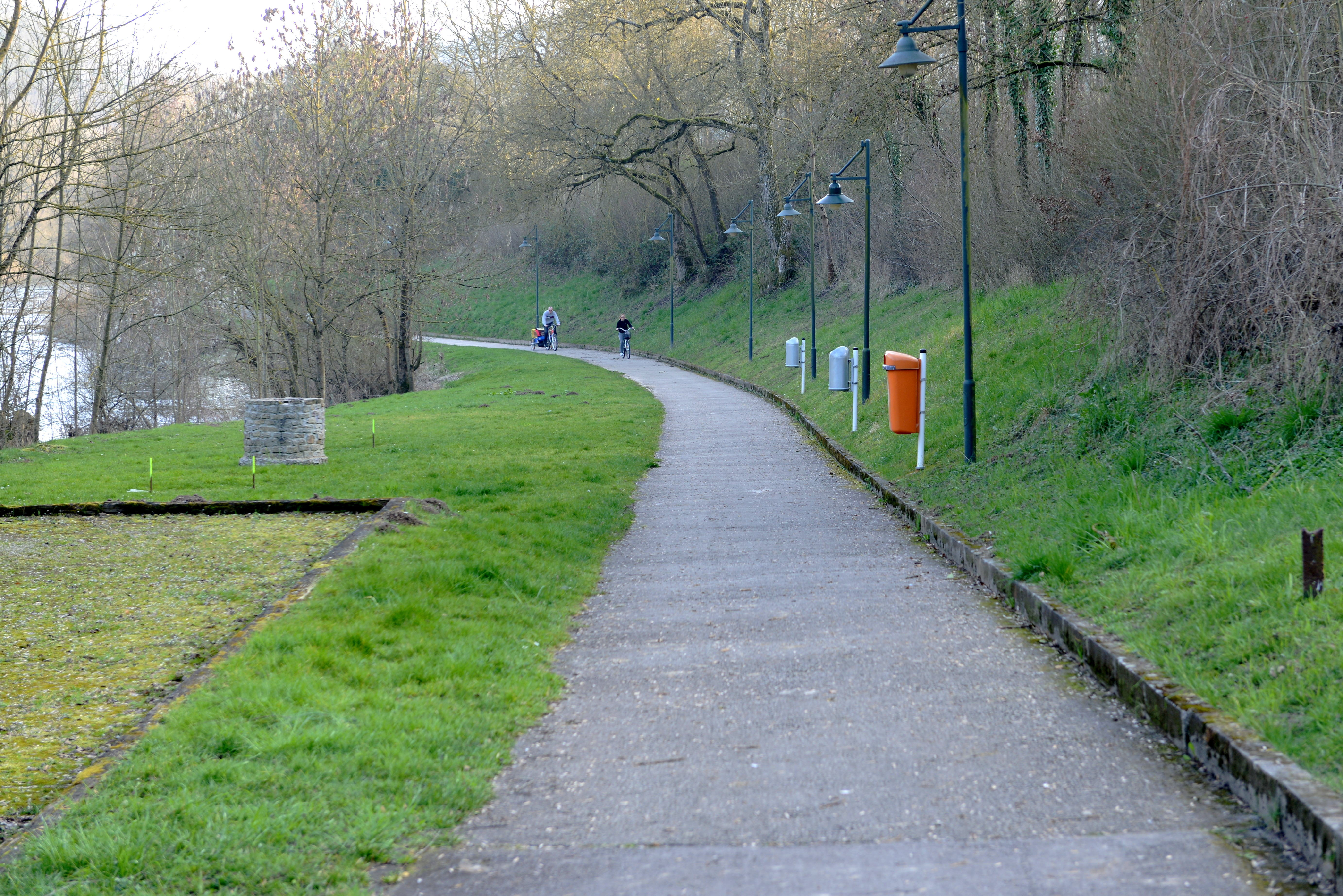 D'Vëlospist PC3 am Millewee zu Méischdref.